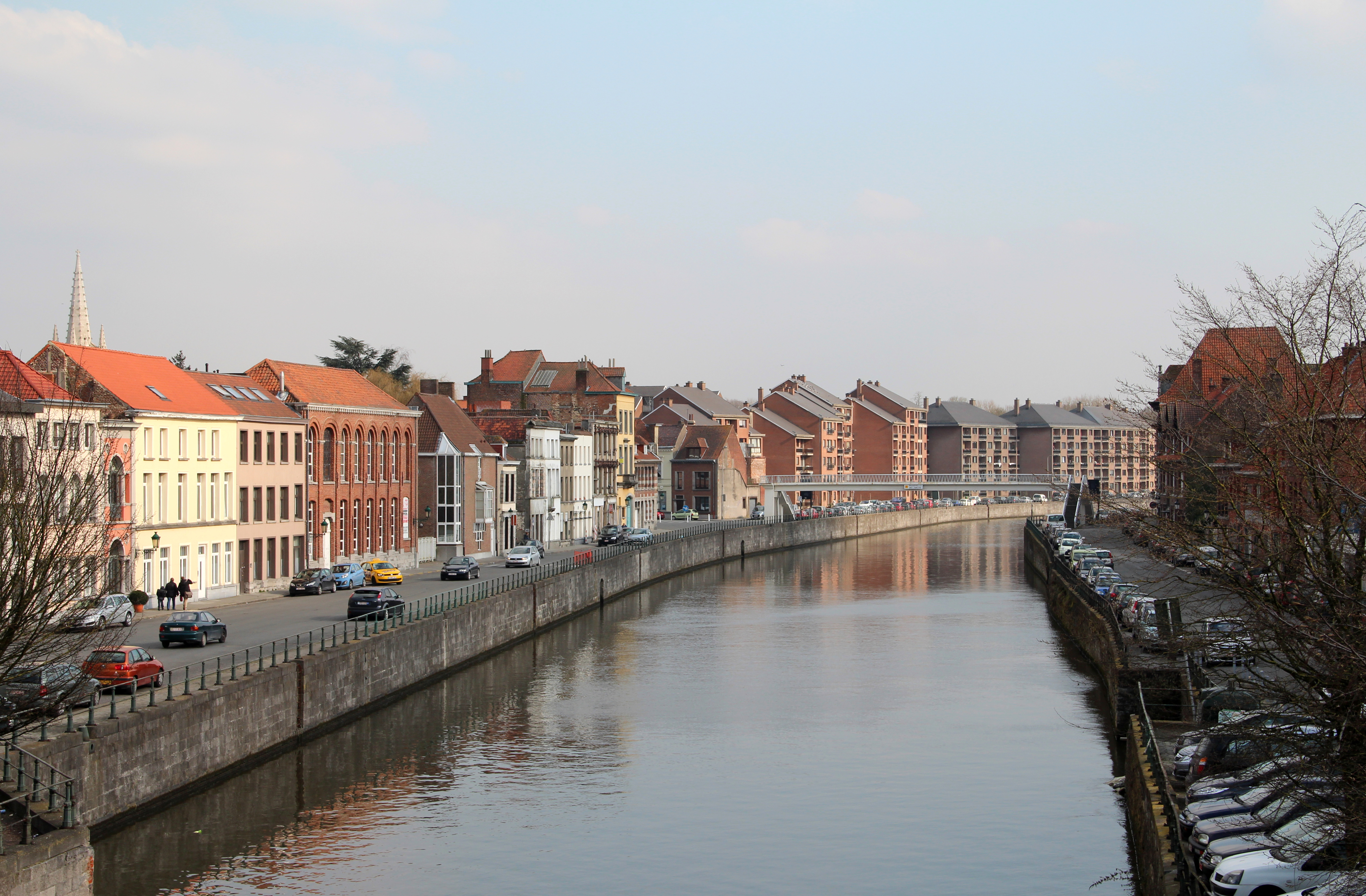 Tournai (Belgique), le quai des Poissonsceaux, le quai Vifquin et l'Escaut.